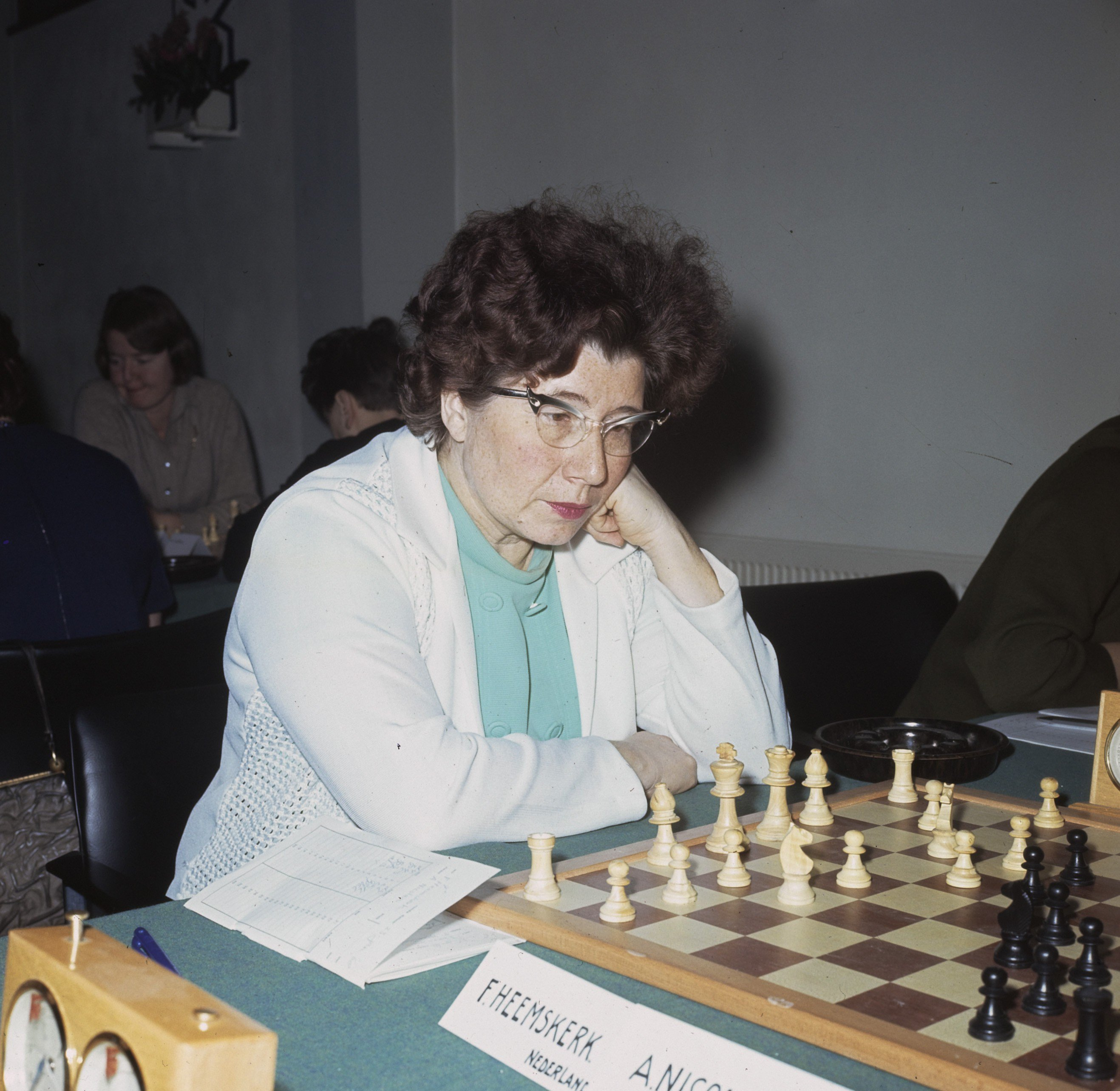 Collectie / Archief : Fotocollectie Anefo Reportage / Serie : [ onbekend ] Beschrijving : Hoogovenschaaktoernooi te Beverwijk; mevrouw Heemskerk , Nederland Datum : 5 januari 1968 Locatie : Beverwijk Trefwoorden : schaken Instellingsnaam : Hoogovenschaaktoernooi Fotograaf : Koch, Eric / Anefo Auteursrechthebbende : Nationaal Archief Materiaalsoort : Dia (kleur) Nummer archiefinventaris : bekijk toegang 2.24.01.07 Bestanddeelnummer : 254-7974